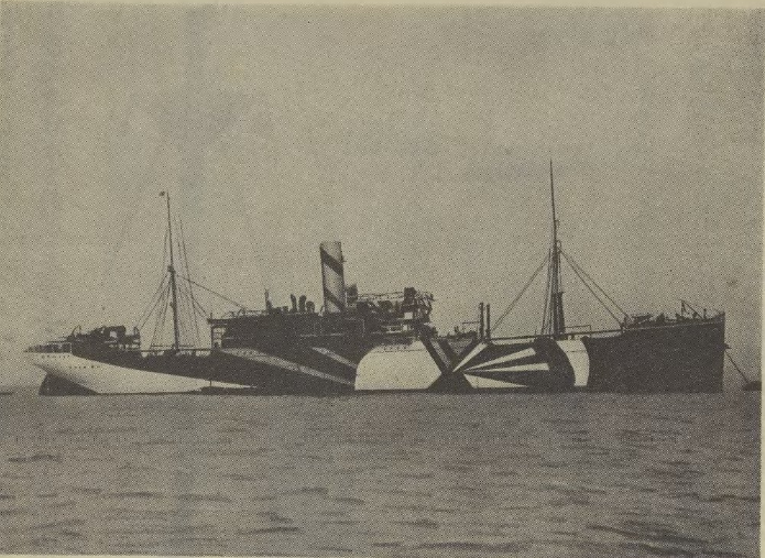 第一次世界大戦中に迷彩塗装を施された日本郵船の貨客船「平野丸」